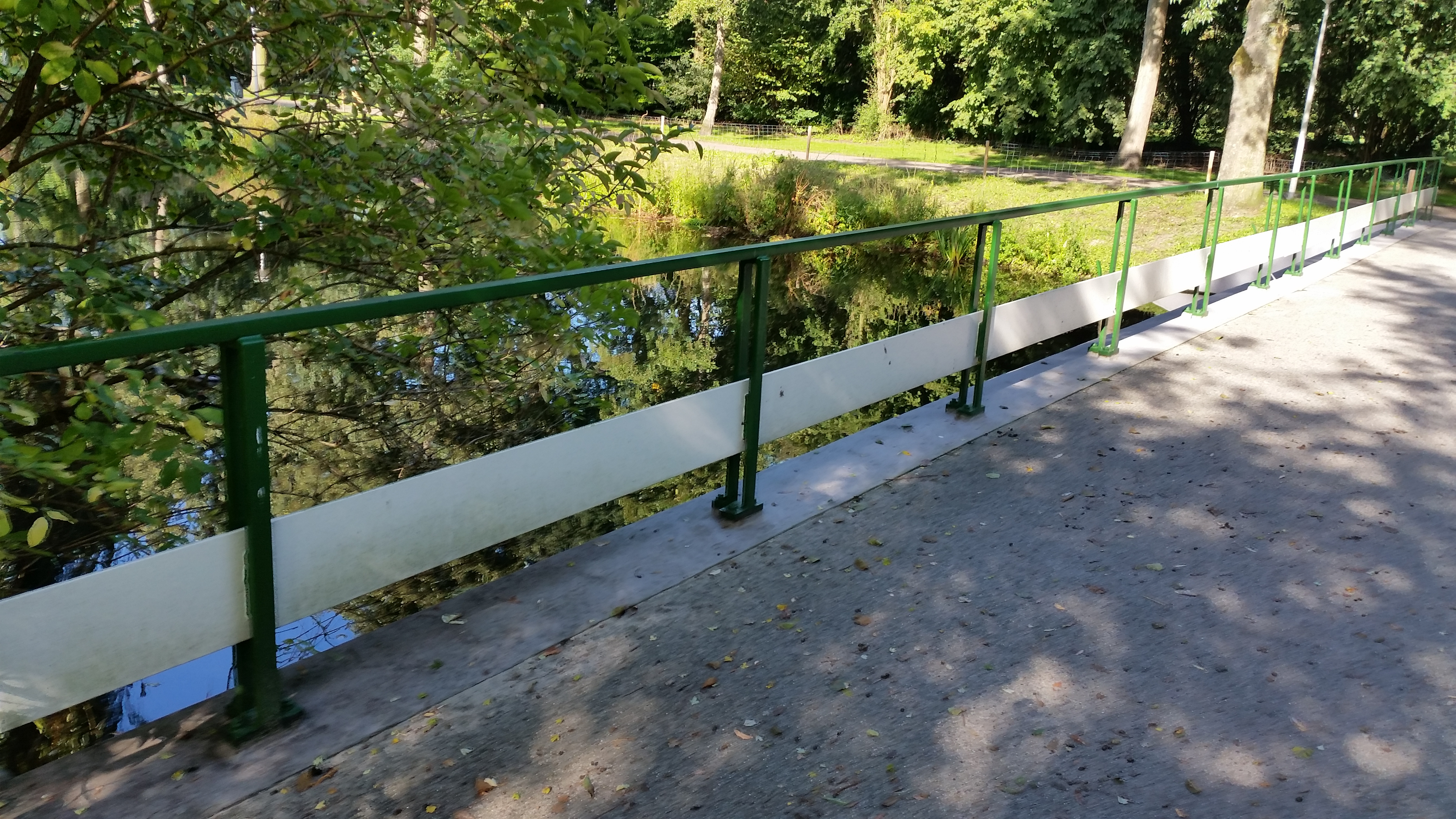 Brug 835 (in Amsterdam), leuning